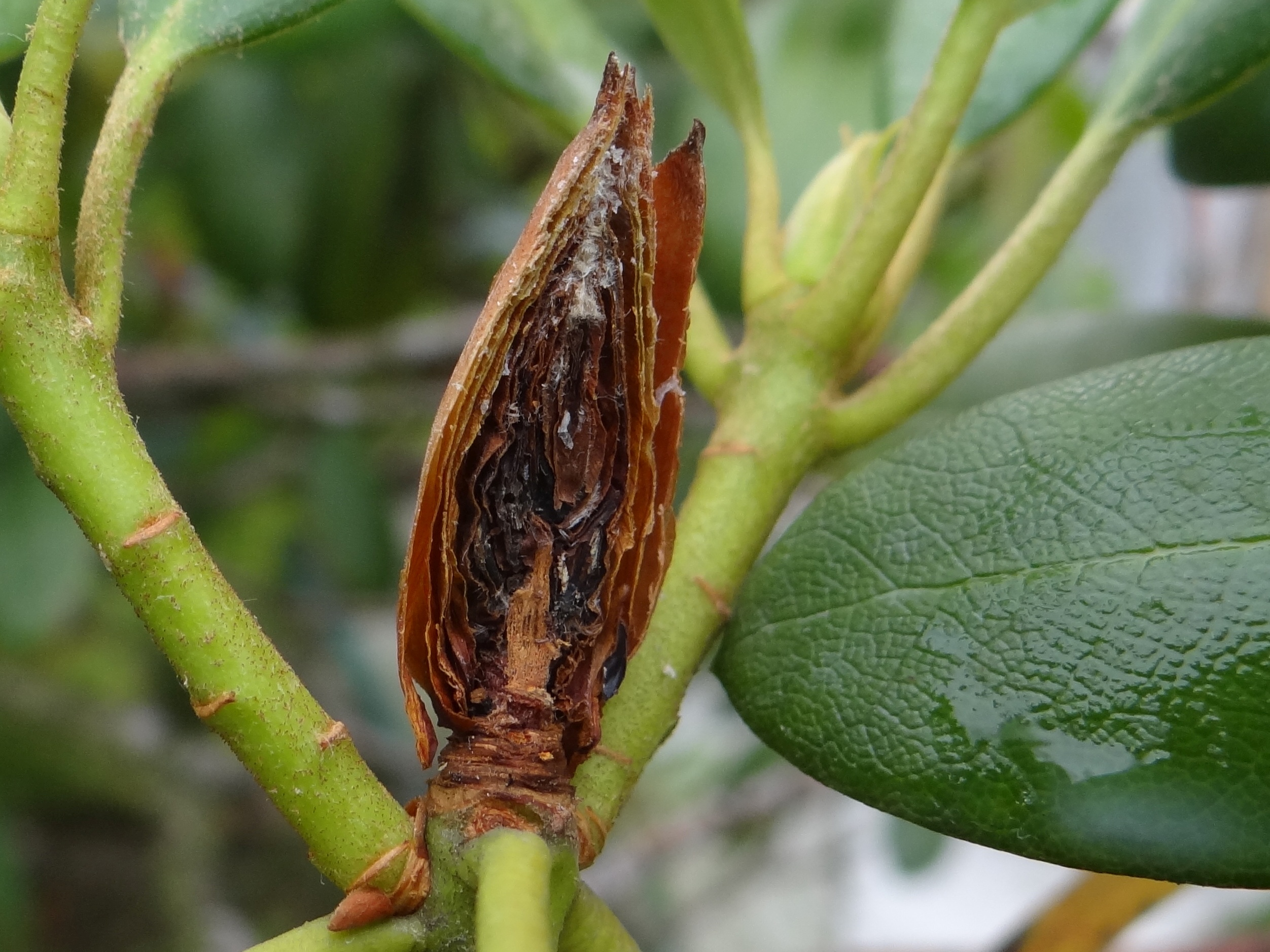 Seifertia azaleae on Rhododendron catawbiensis